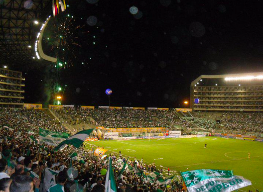 Campeón